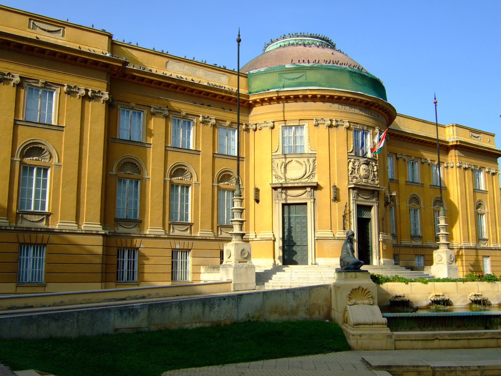 Déri Múzeum (Debrecen, Déri tér) This is a photo of a monument in Hungary. Identifier: 5226